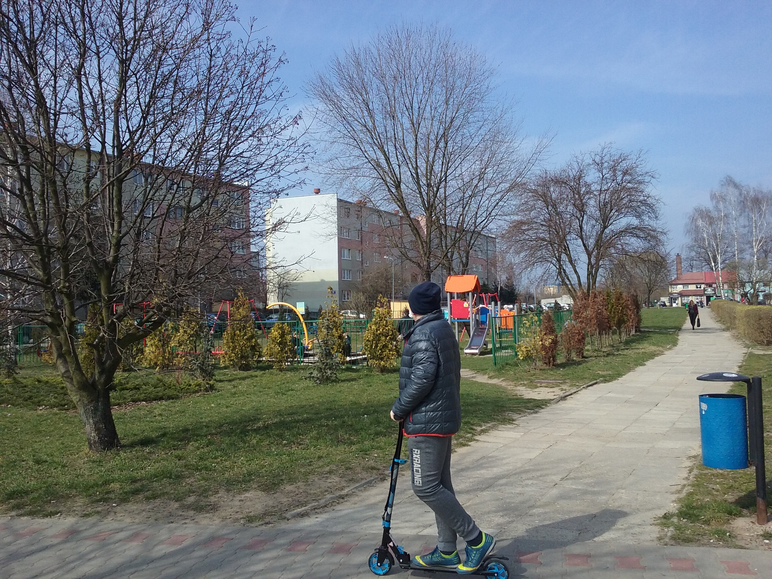 Tomaszów Mazowiecki w województwie łódzkim PL, EU. Fragment najwieksego tomaszowskiego osiedla mieszkaniowego Niebrów. CC0